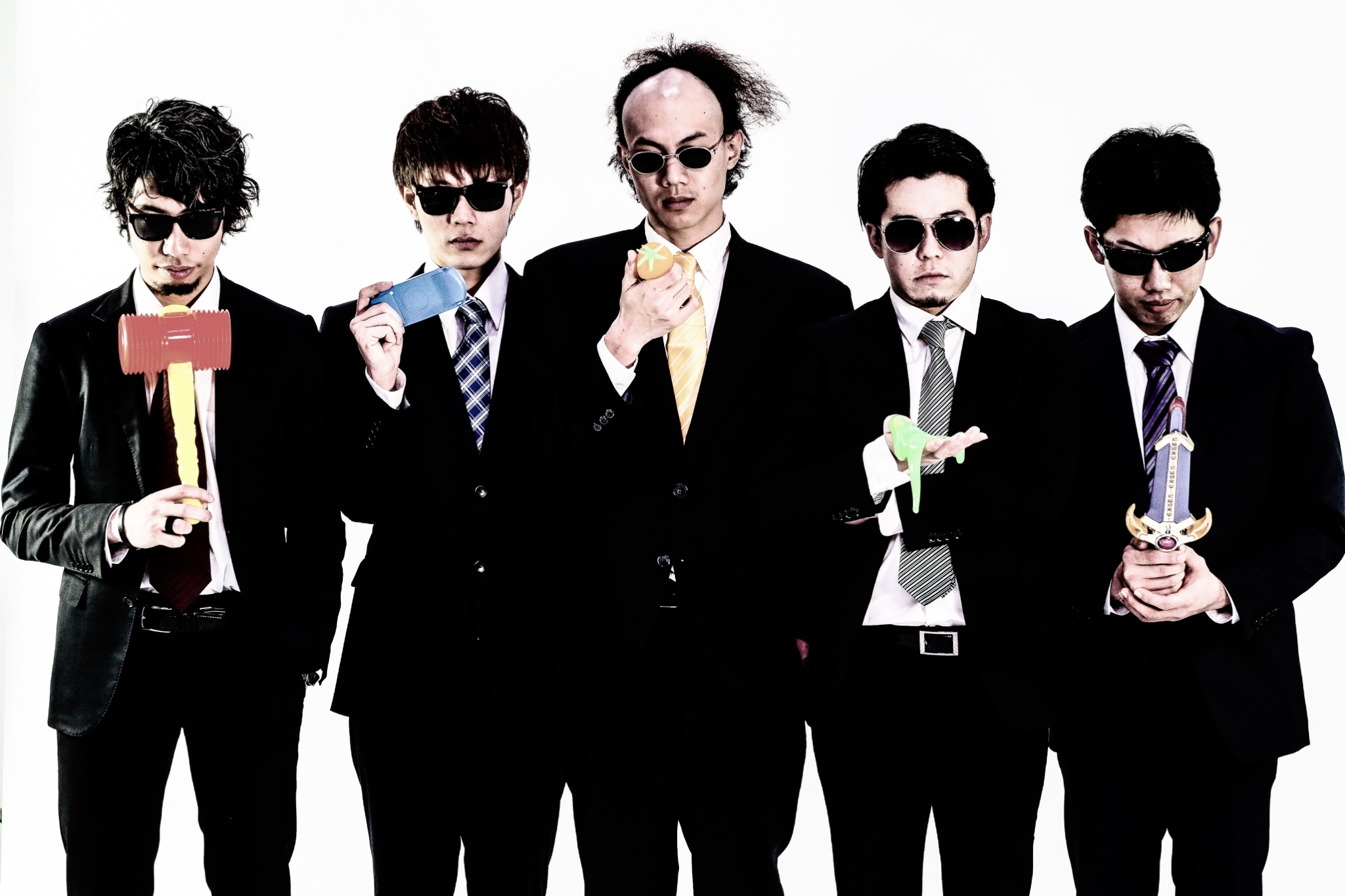 2018年12月撮影